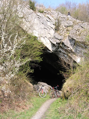 Haupteingang zur Kulturhöhle „Hohler Stein“ im Lörmecketal bei Rüthen-Kallenhardt